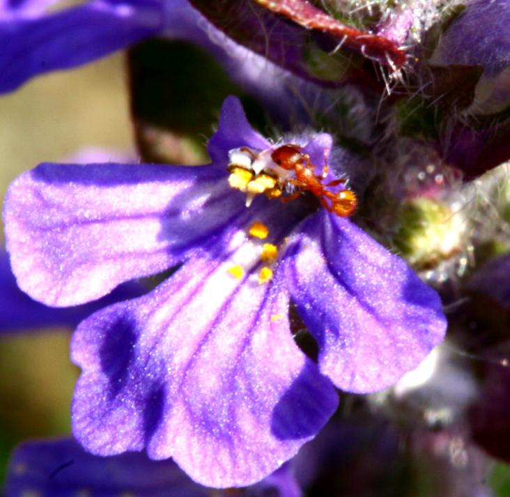 Ajuga reptans